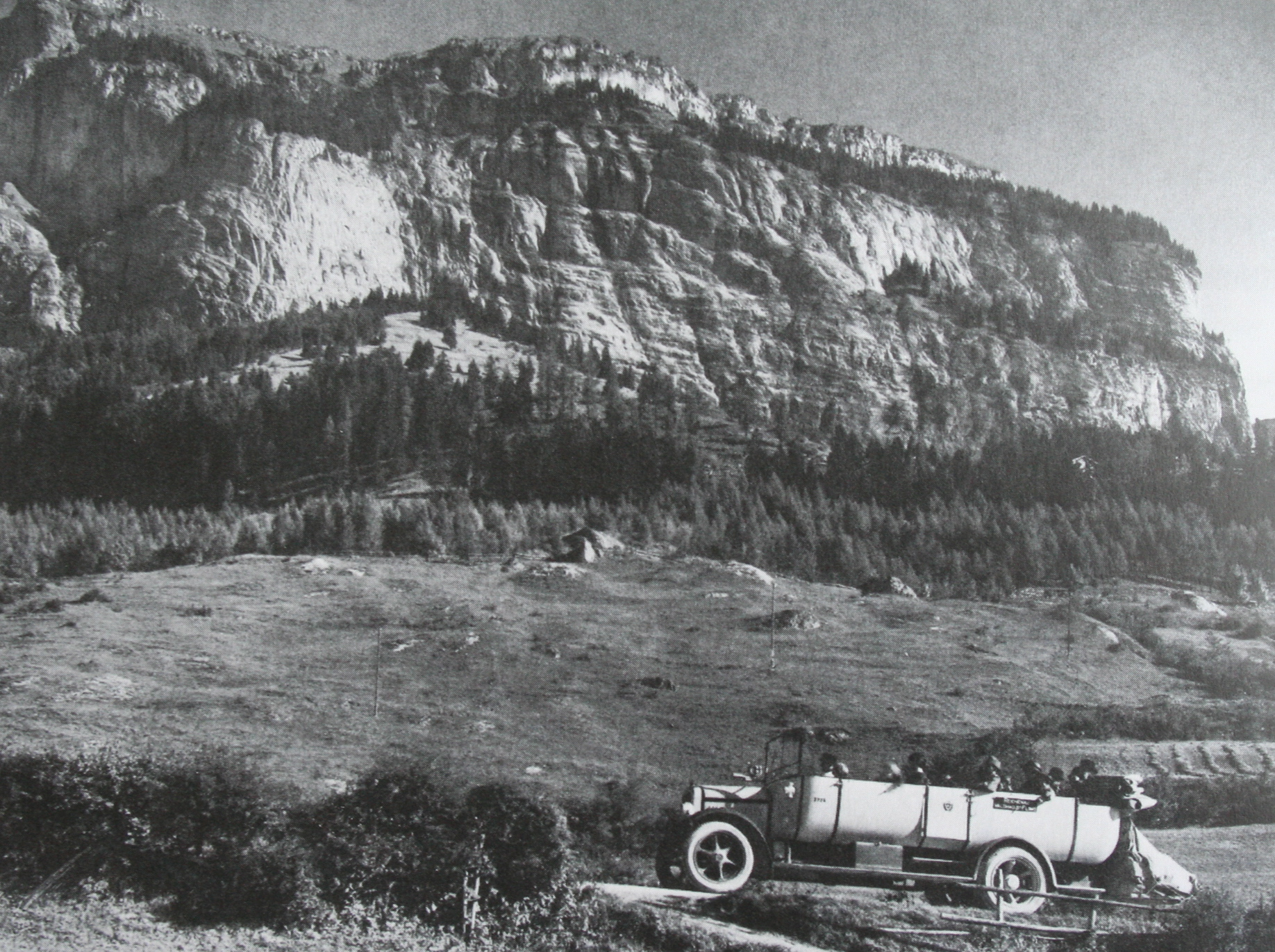 Car Alpin vor dem Flimserstein